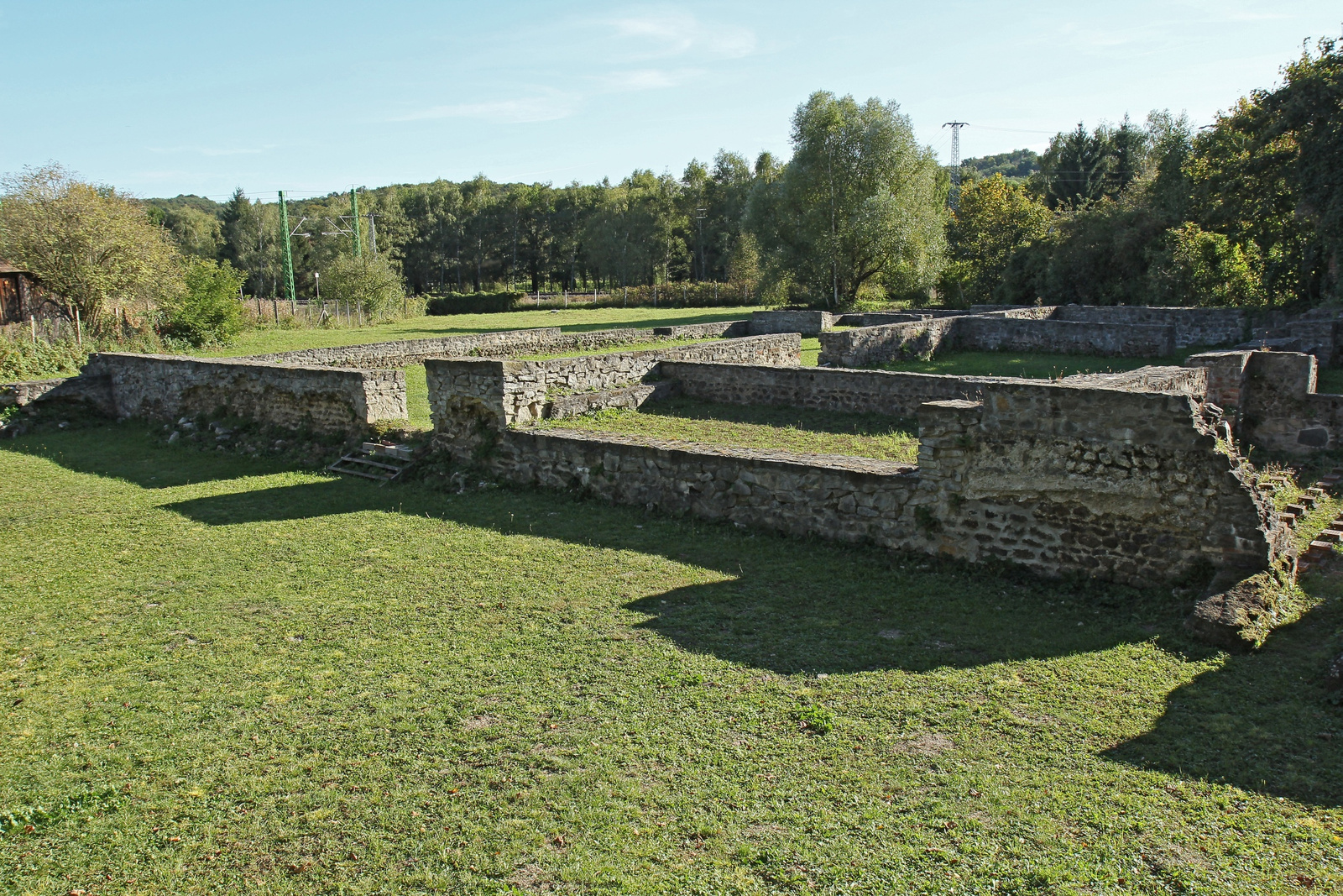 Villa Publica romjai (Zalalövő, Kossuth u. 1–2., 5–9.) This is a photo of a monument in Hungary, Identifier: 11088